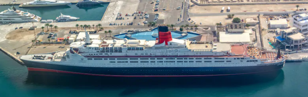 Navidad en el Hotel QE2